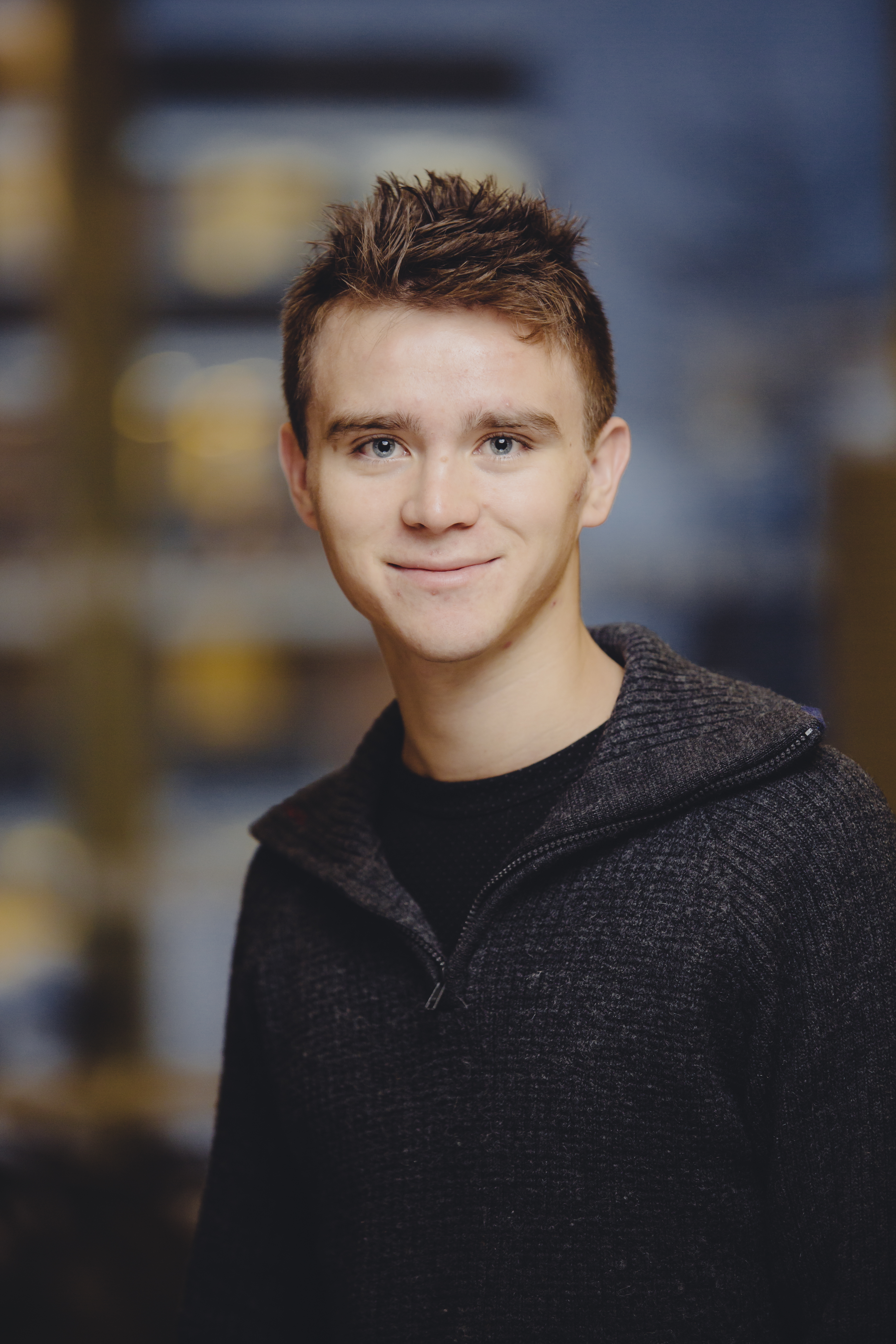 Benjamin Arvola Notkevich. Tromsø kommune. Foto: Marius Fiskum /